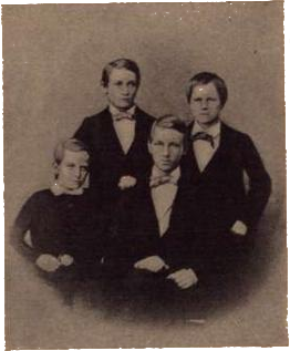 Professor Peter Jonas Colletts og Camilla Colletts barn, fotografert i 1860. Fra venstre: Emil, Alf, Robert, Oscar Collett.